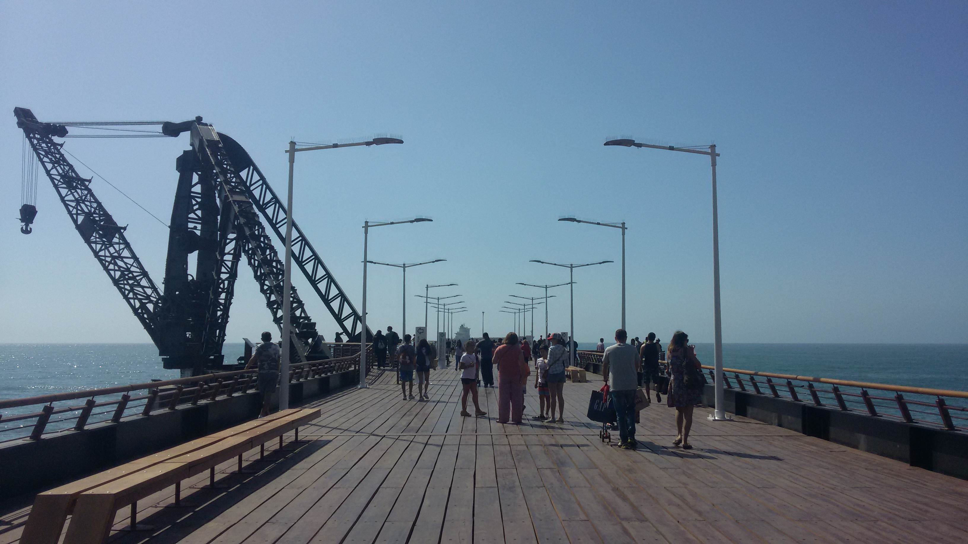 Paseo del muelle Vergara (Viña del Mar) en el verano 2016-2017.